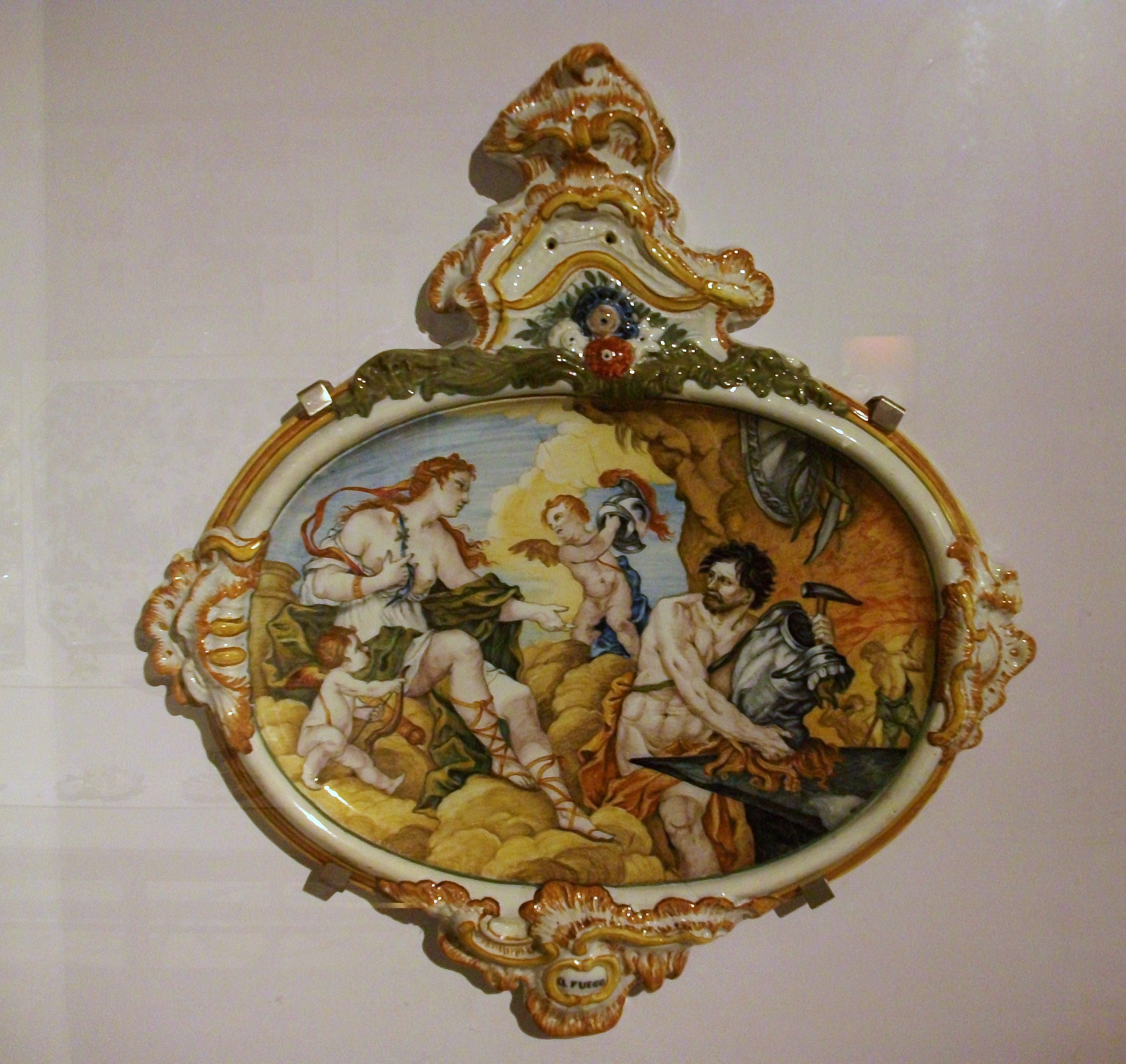 Cornucòpia amb representació del foc, pisa de l'Alcora, 1750 -1780, museu de Ceràmica de València.